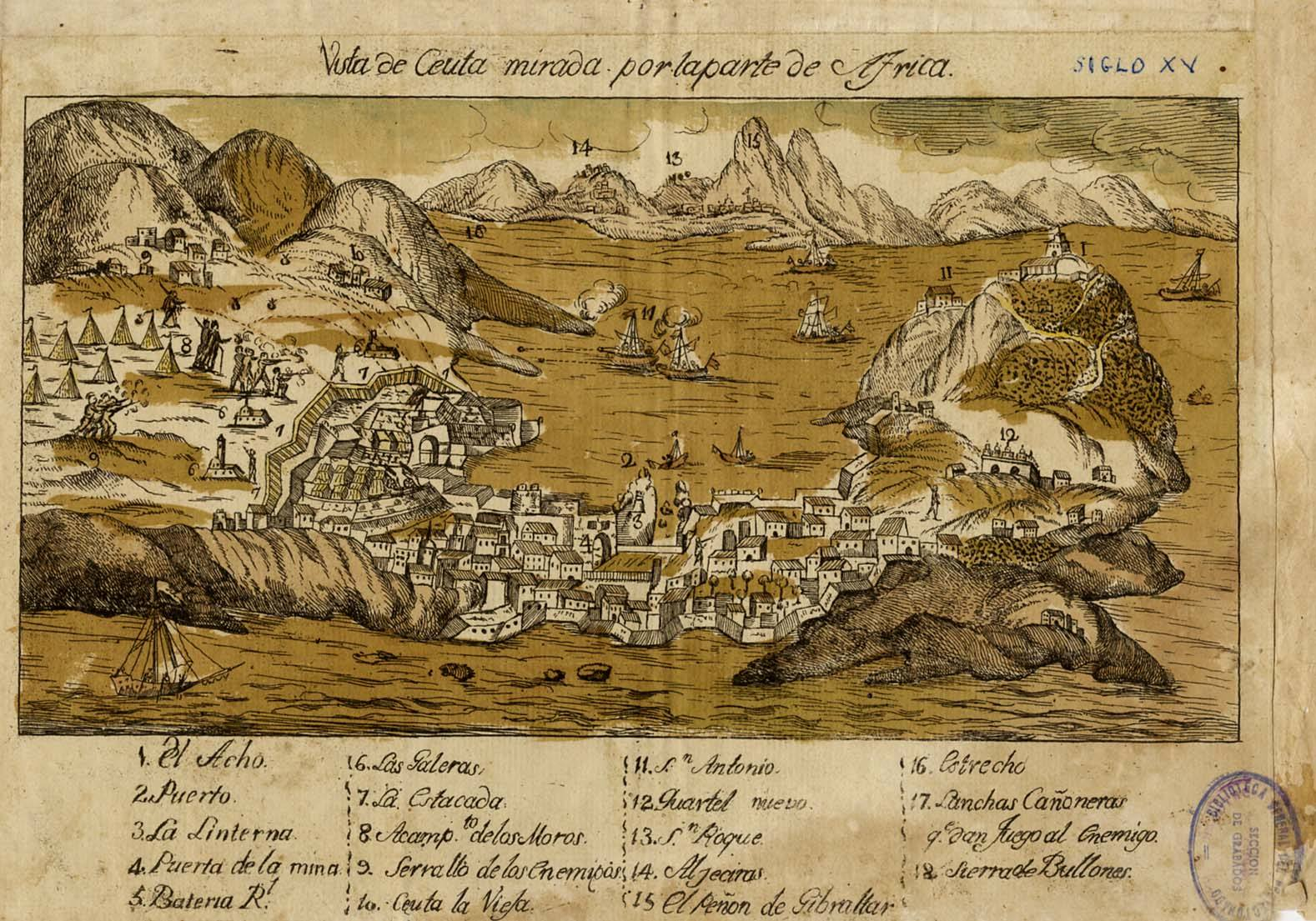 Croquis de Ceuta, el estrecho de Gibraltar y la fuerzas sitiadoras marroquíes durante el asedio del sultán al-Yazid.